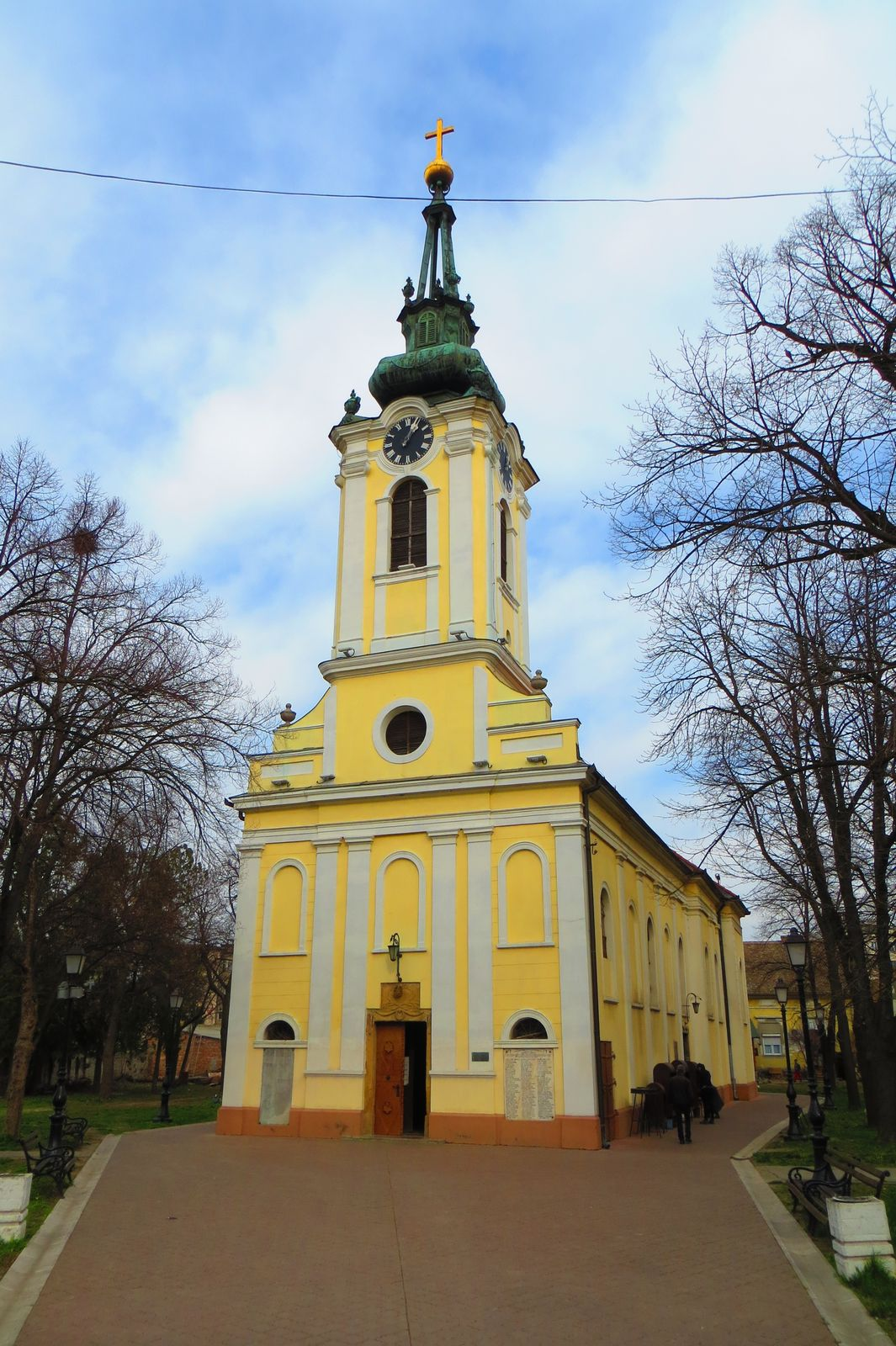 Hram Uspenja presvete Bogorodice